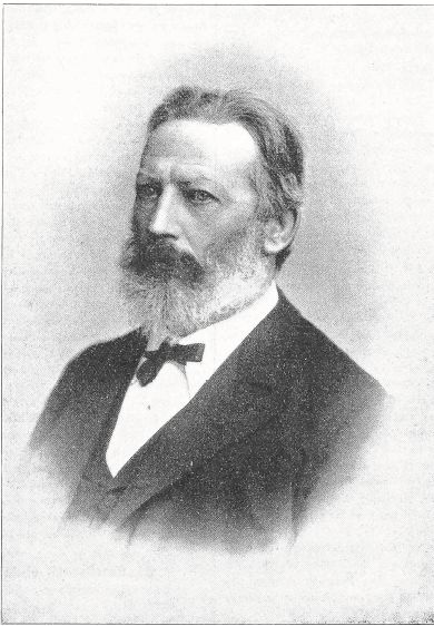 Portrait von Julius Stadler, 1828–1904